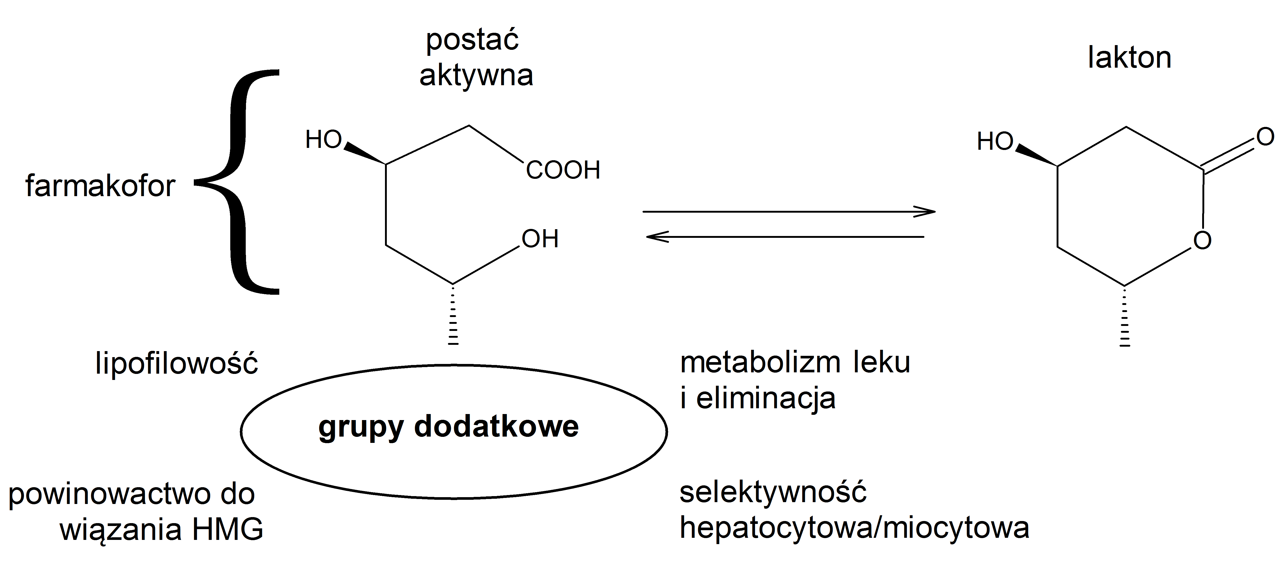 Schematyczna budowa cząsteczki statyn (Safety and Statins: Pharmacologic and Clinical Perspectives)